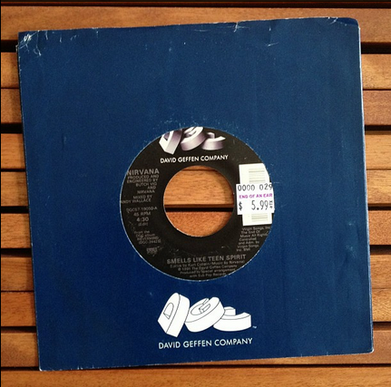 Первое издание сингла "Smells Like Teen Spirit" музыкального коллектива Nirvana на грампластинке.